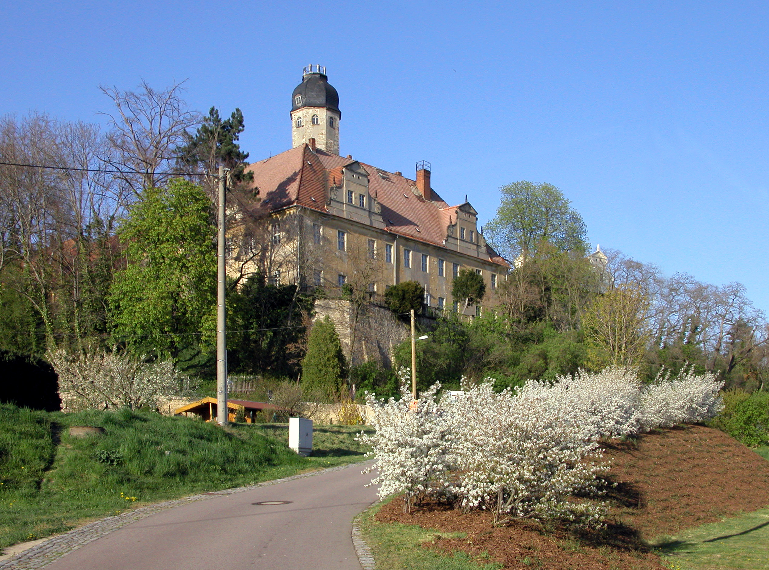 21.04.2005 01665 Schieritz (Diera-Zehren): Renaissanceschloß (1556/1601) [DSCN6420.TIF]20050421154DR.JPG(c)Blobelt